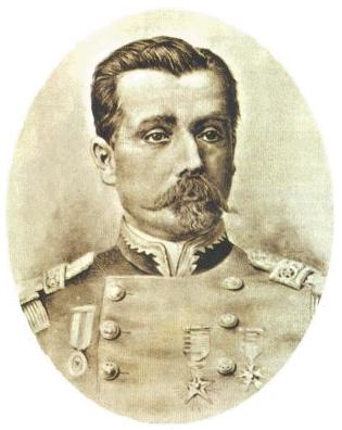 General Estanislao del Canto Arteaga 1840-1924